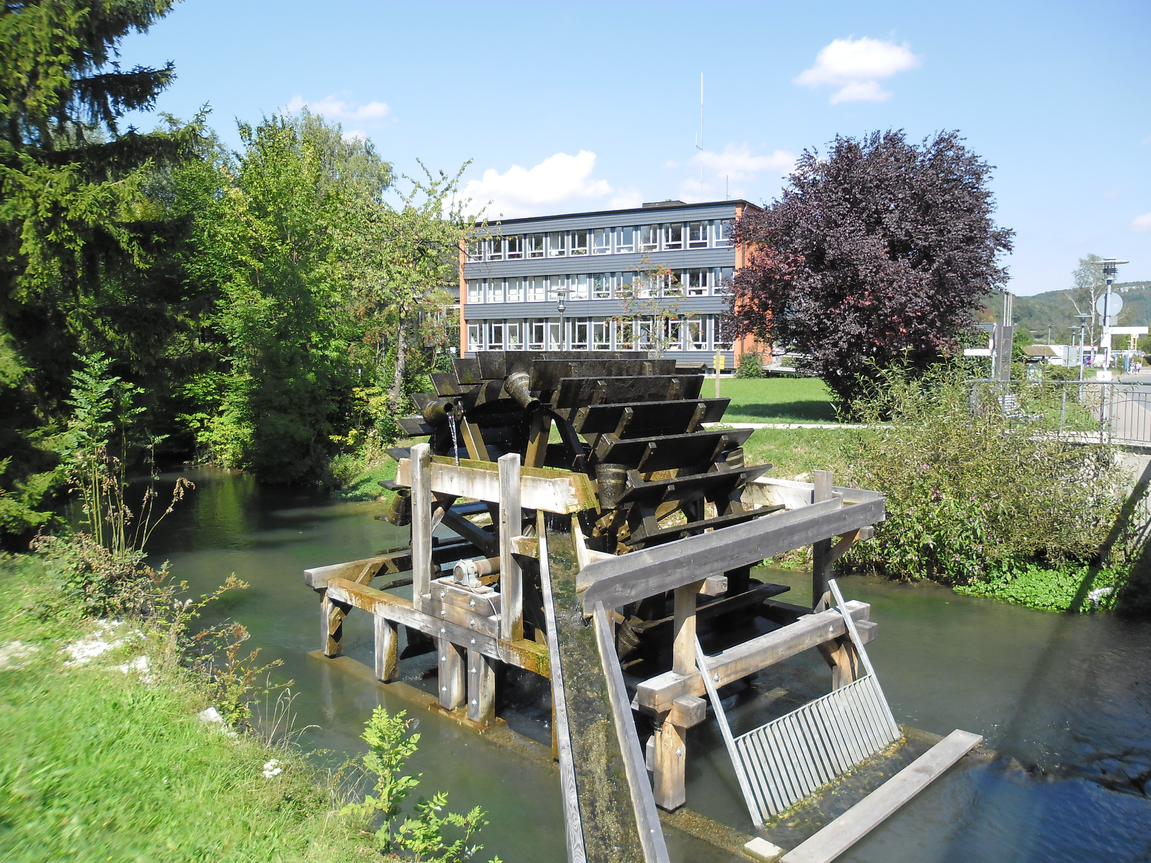 Wasserschöpfrad an der Wiesent mit dem Gebäude der Tourismuszentrale Fränkische Schweiz im Hintergrund